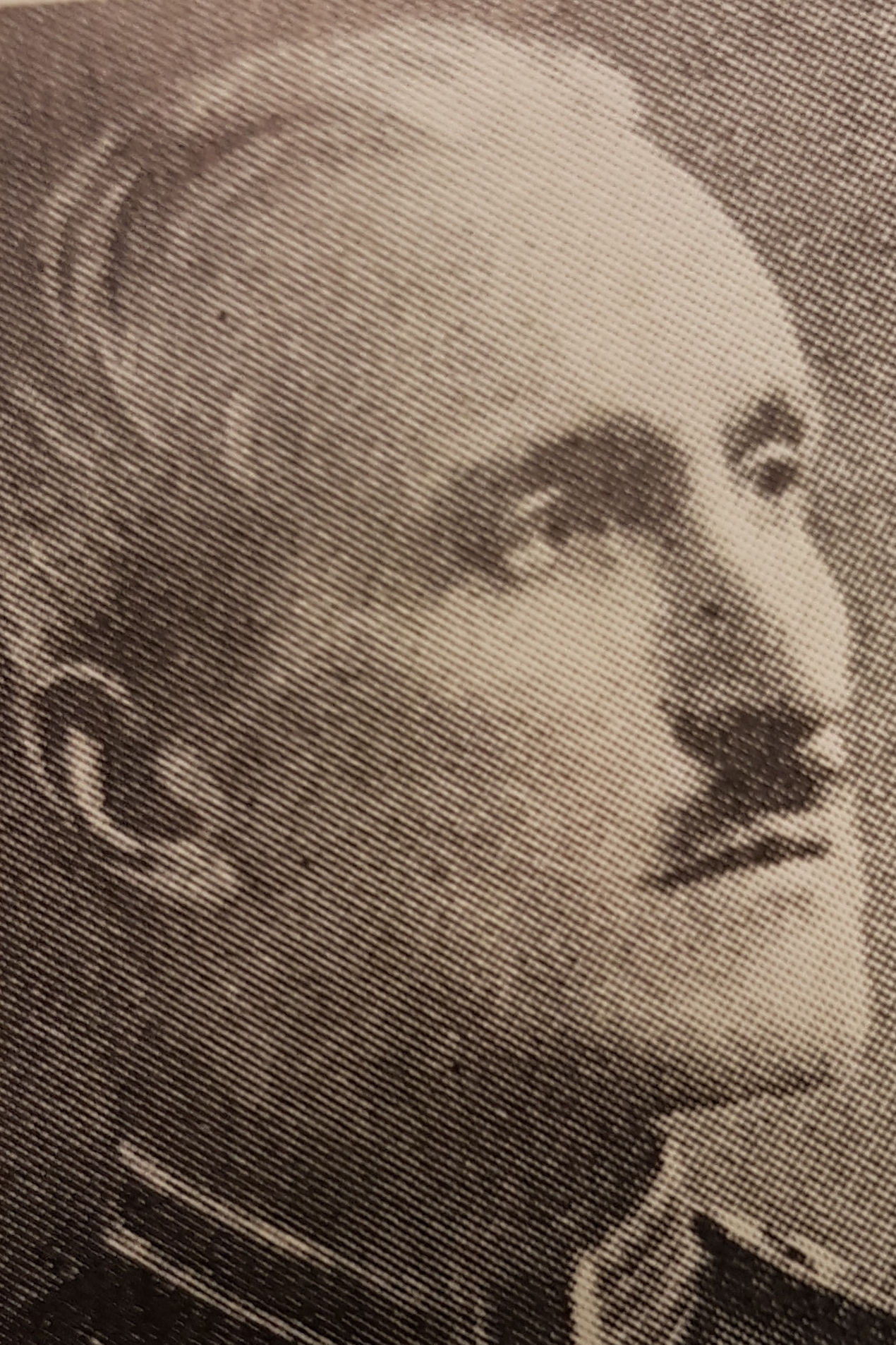 Magnus Adlercreutz, avfotograferad porträttbild från Allhems Svenskt konstnärslexikon.